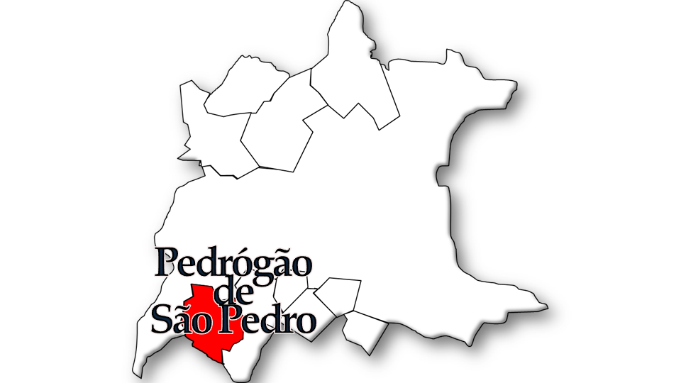 População